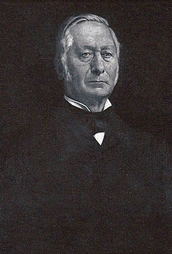 Porträt (Maler unbekannt) von Johann Schlösser, gestorben am 21. Juni 1897; Kerzenfabrikant in Köln